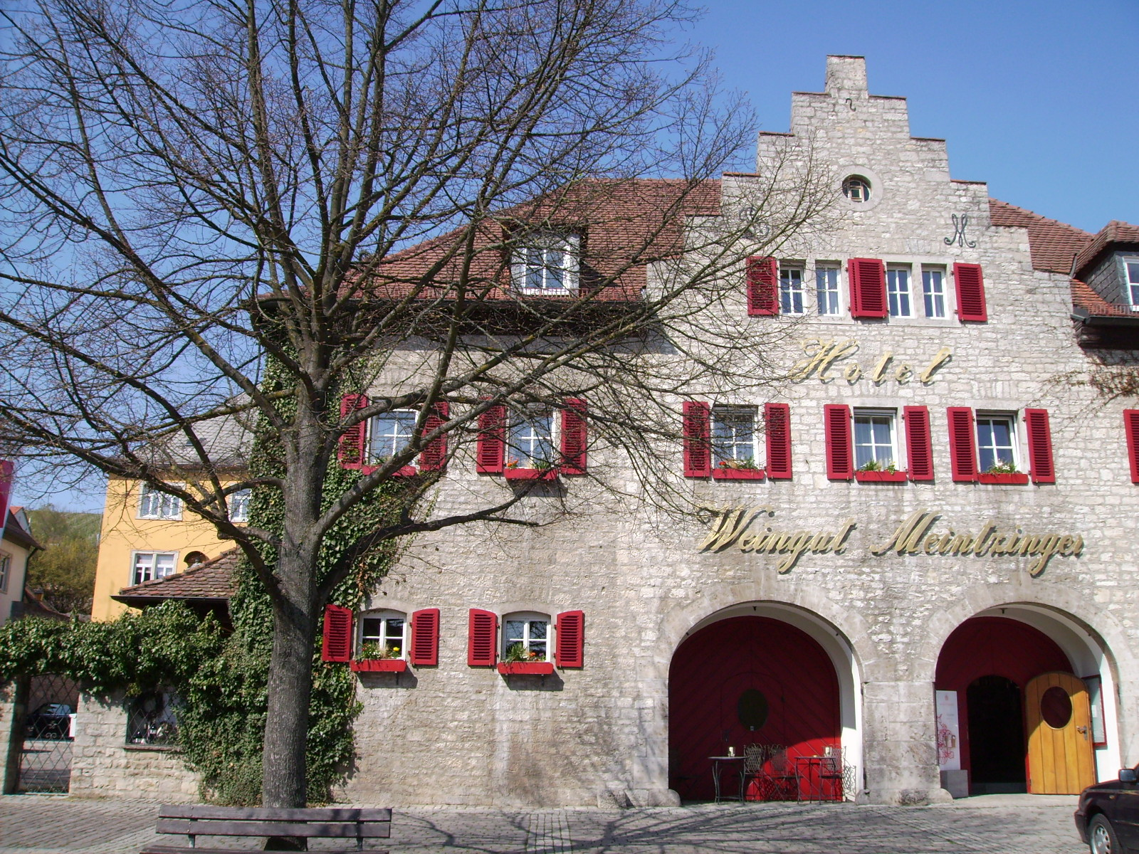 Frickenhausen am Main. Frühere Weinkellerei des Domkapitels zu Würzburg, 1475 unter Wilhelm Herr zu Limburg errichtet von dem Baumeister Jorg von Elrichhausen. Heute privates Weingut.